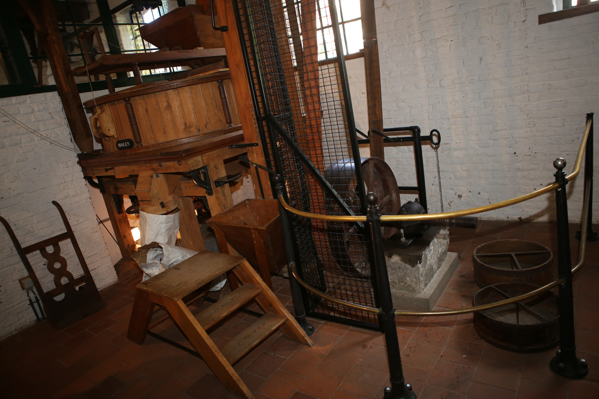 Een graanmolen, in het Nationaal Jenevermuseum Hasselt, tijdens een bezoek op 26/10/2013.